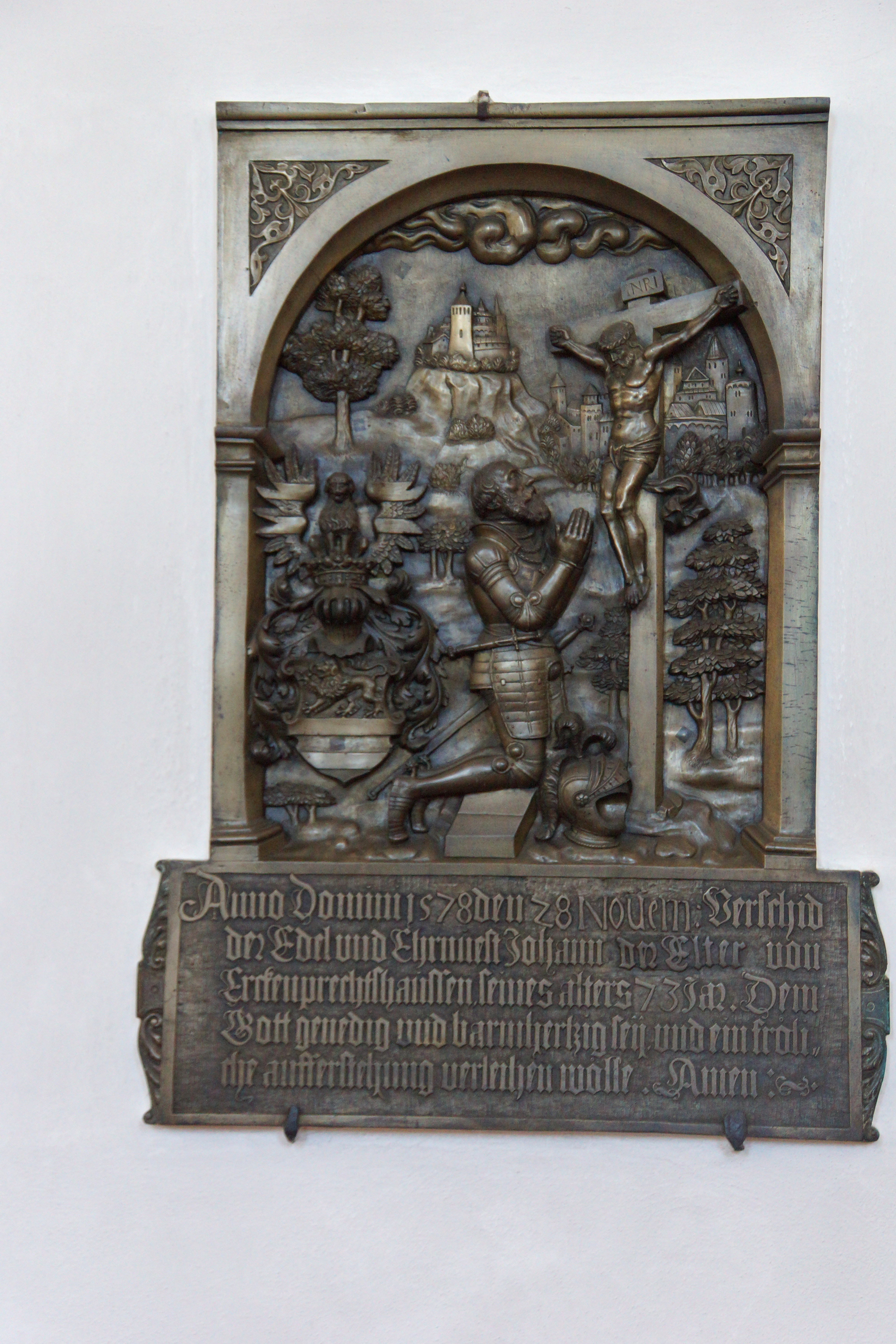 Die katholische Pfarrkirche St. Vitus in Ursensollen, Oberpfalz